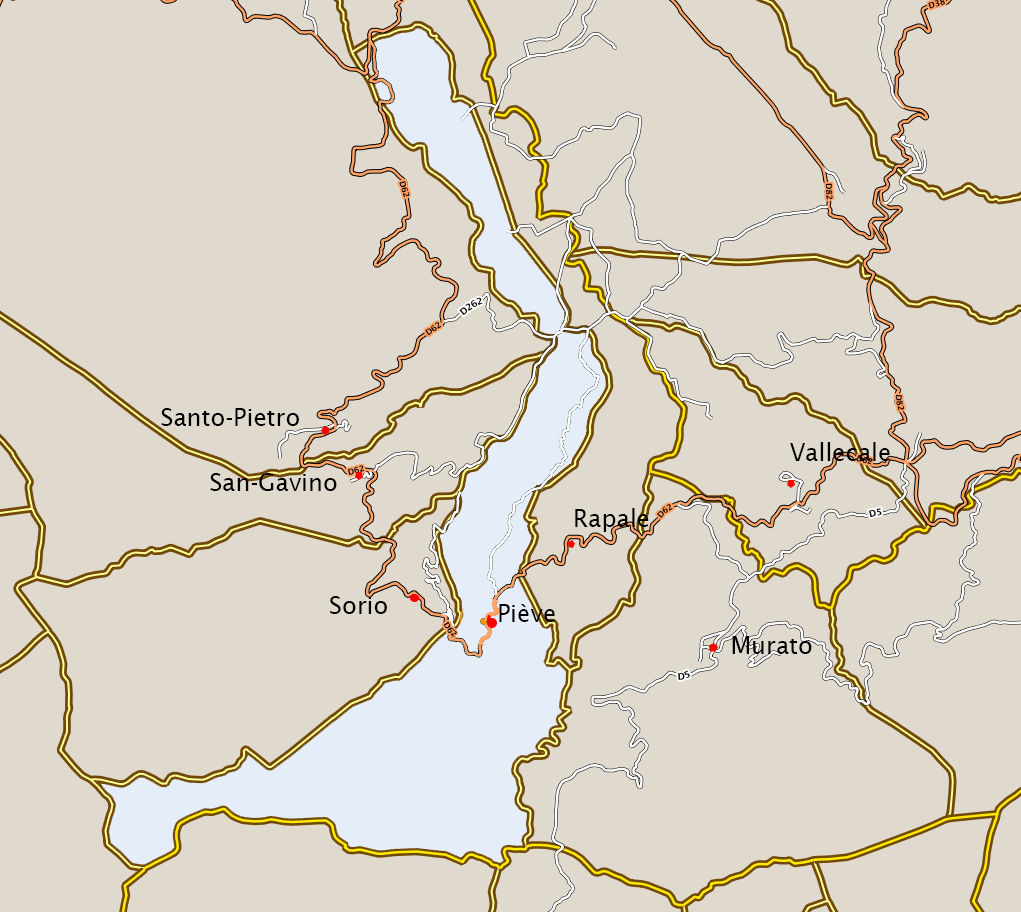 Piève, Nebbio (Corse) - Carte des limites territoriales de la commune et de ses accès routiers